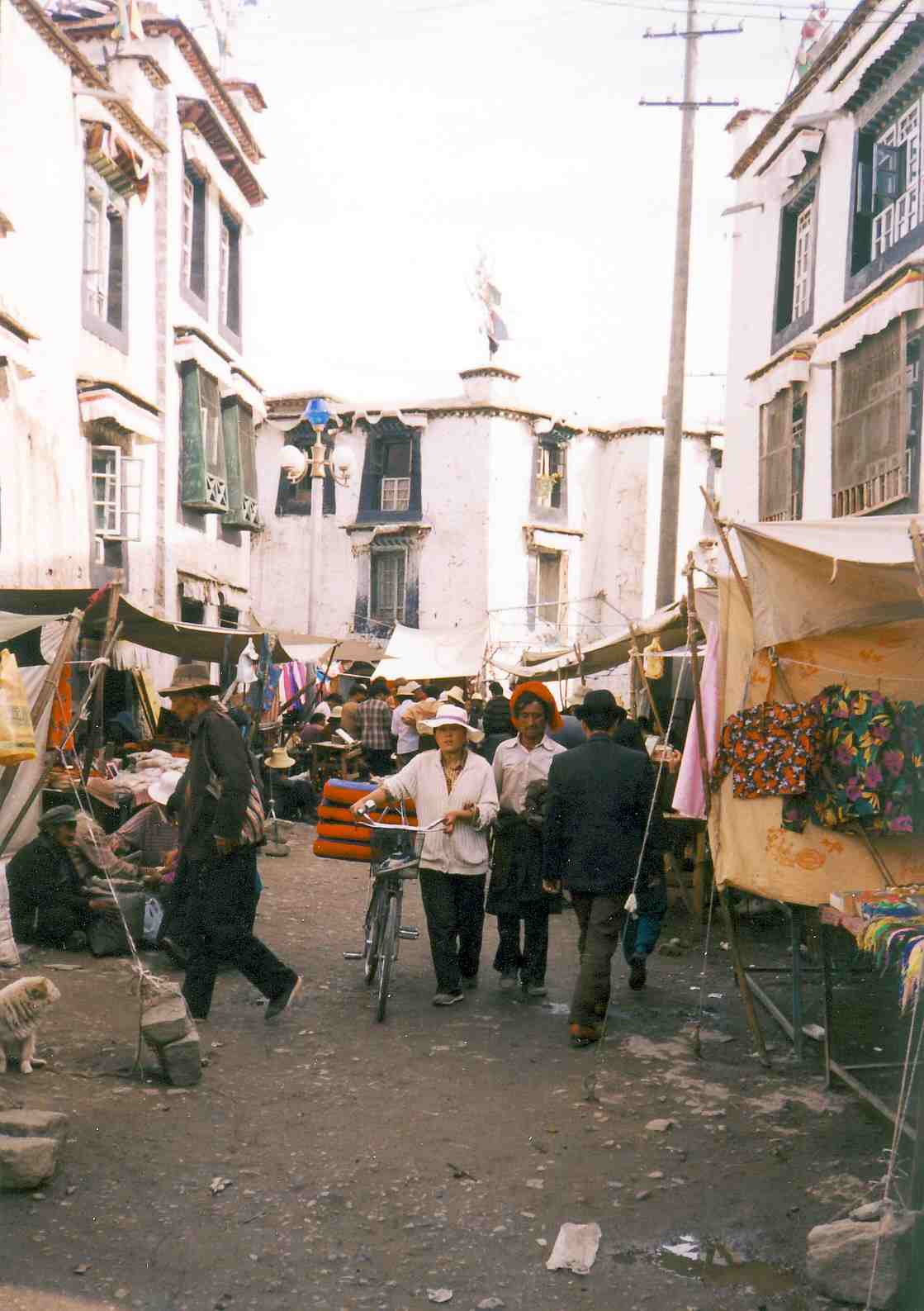 Barkhor Street scene.